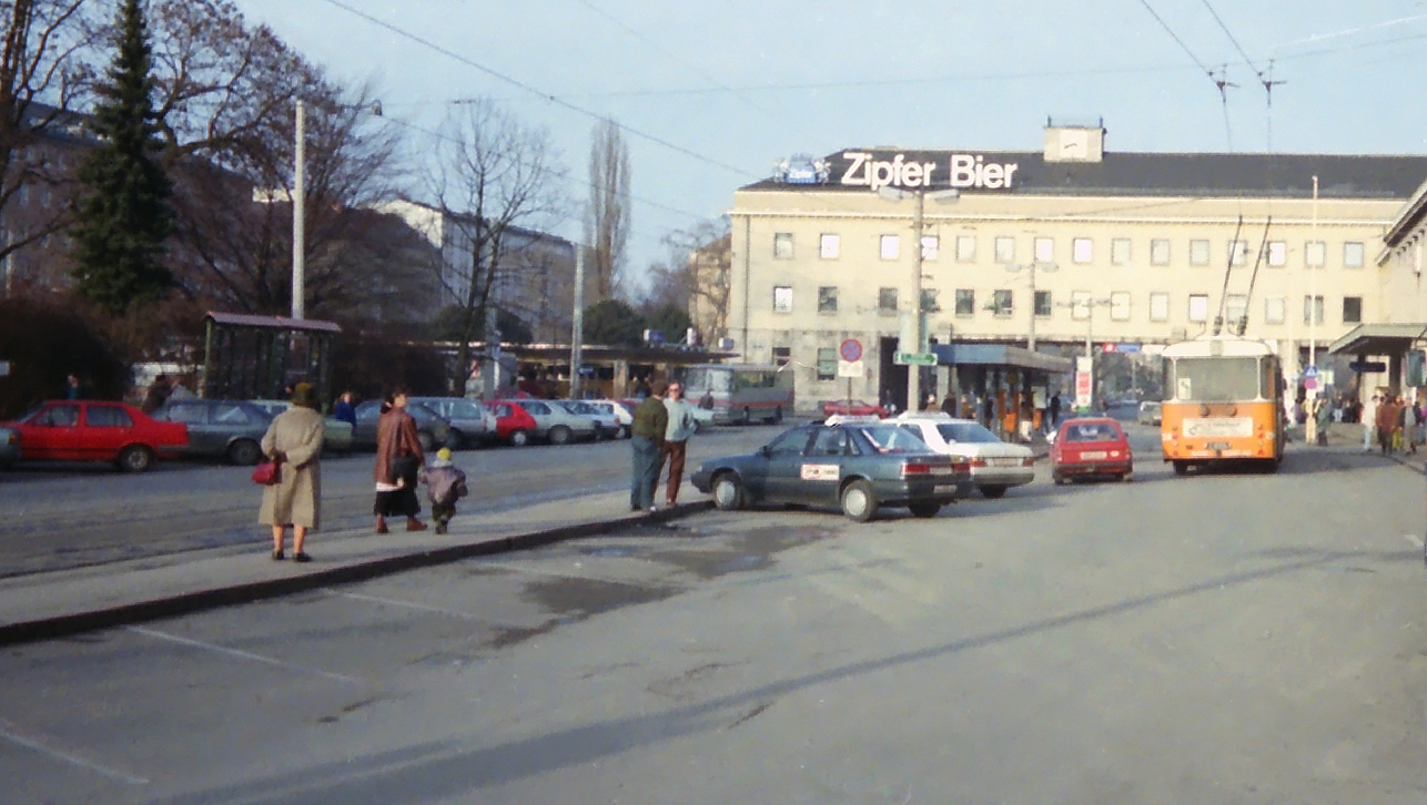 Der alte Vorplatz des Linzer Hauptbahnhofs mit den Haltestellen der Straßenbahnlinie 3 und der Oberleitungsbuslinie 21. Aufnahme mit einer Einwegkamera (Fuji QuickSnap Panorama). Scan von Negativ